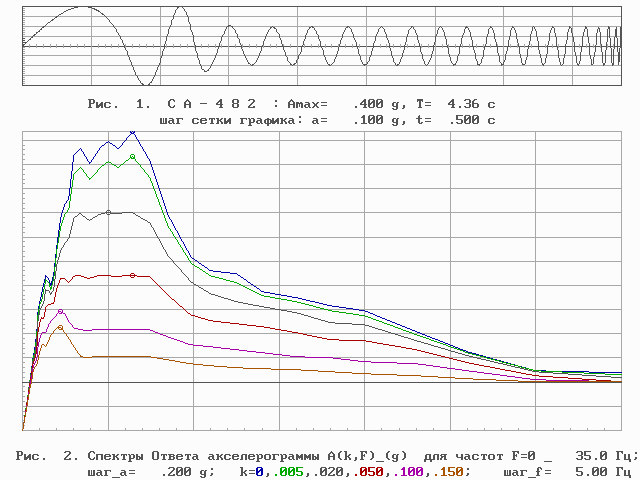 Графики синтезированной акселерограммы СА-482 и ее спектров ответа